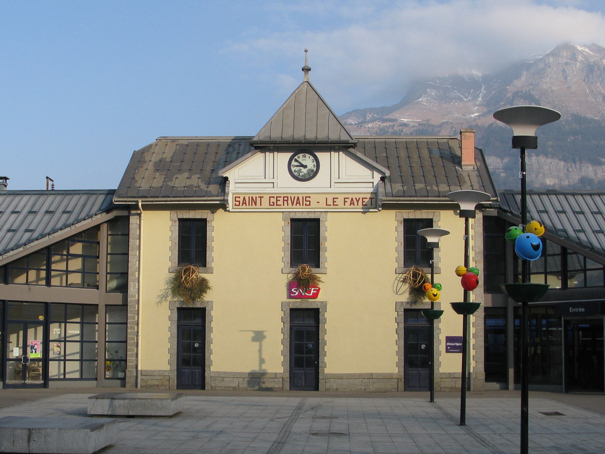 La façade de la gare de Saint-Gervais-les-Bains-Le Fayet